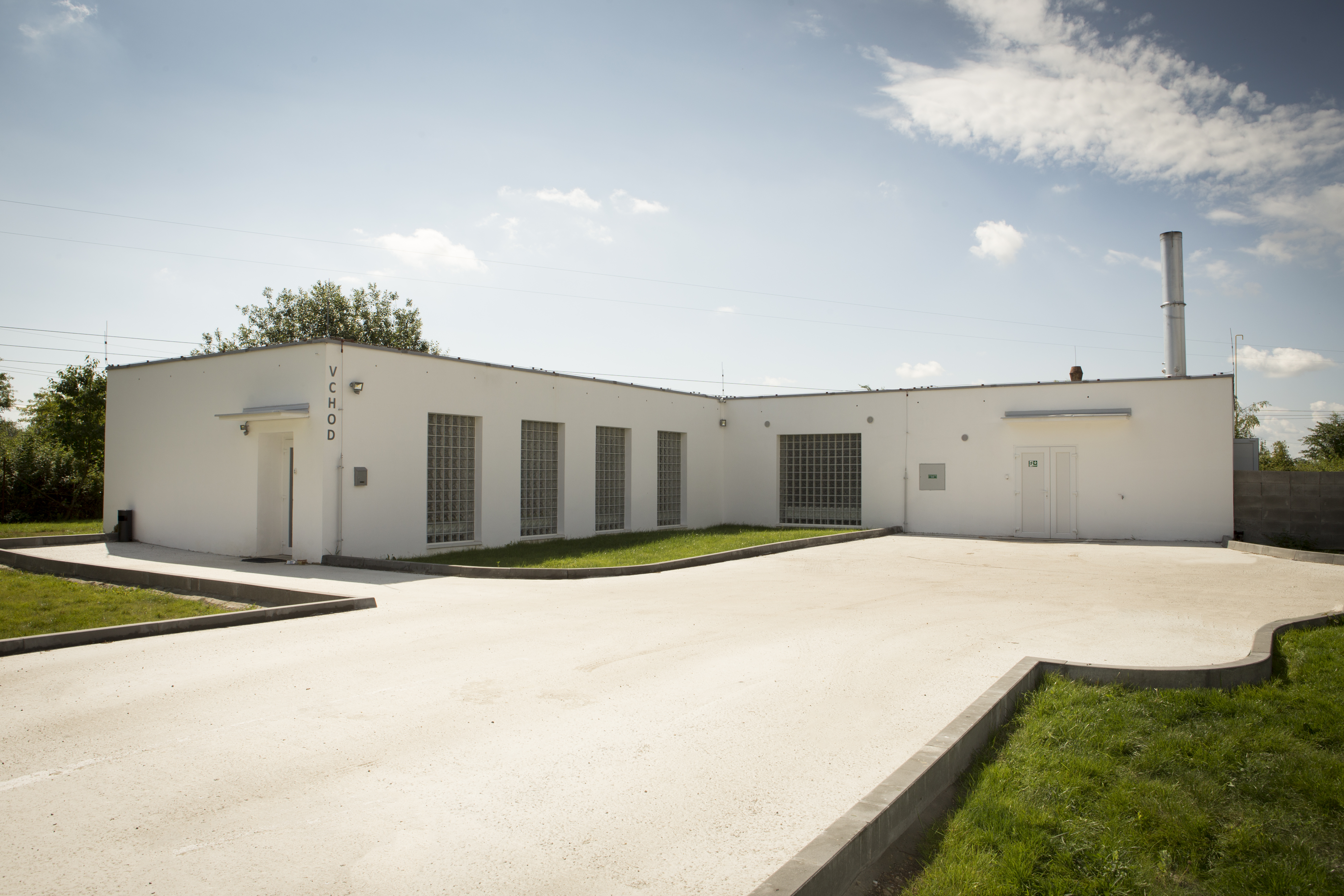 Exteriér zvířecího krematoria v Praze 9 - Běchovicích.